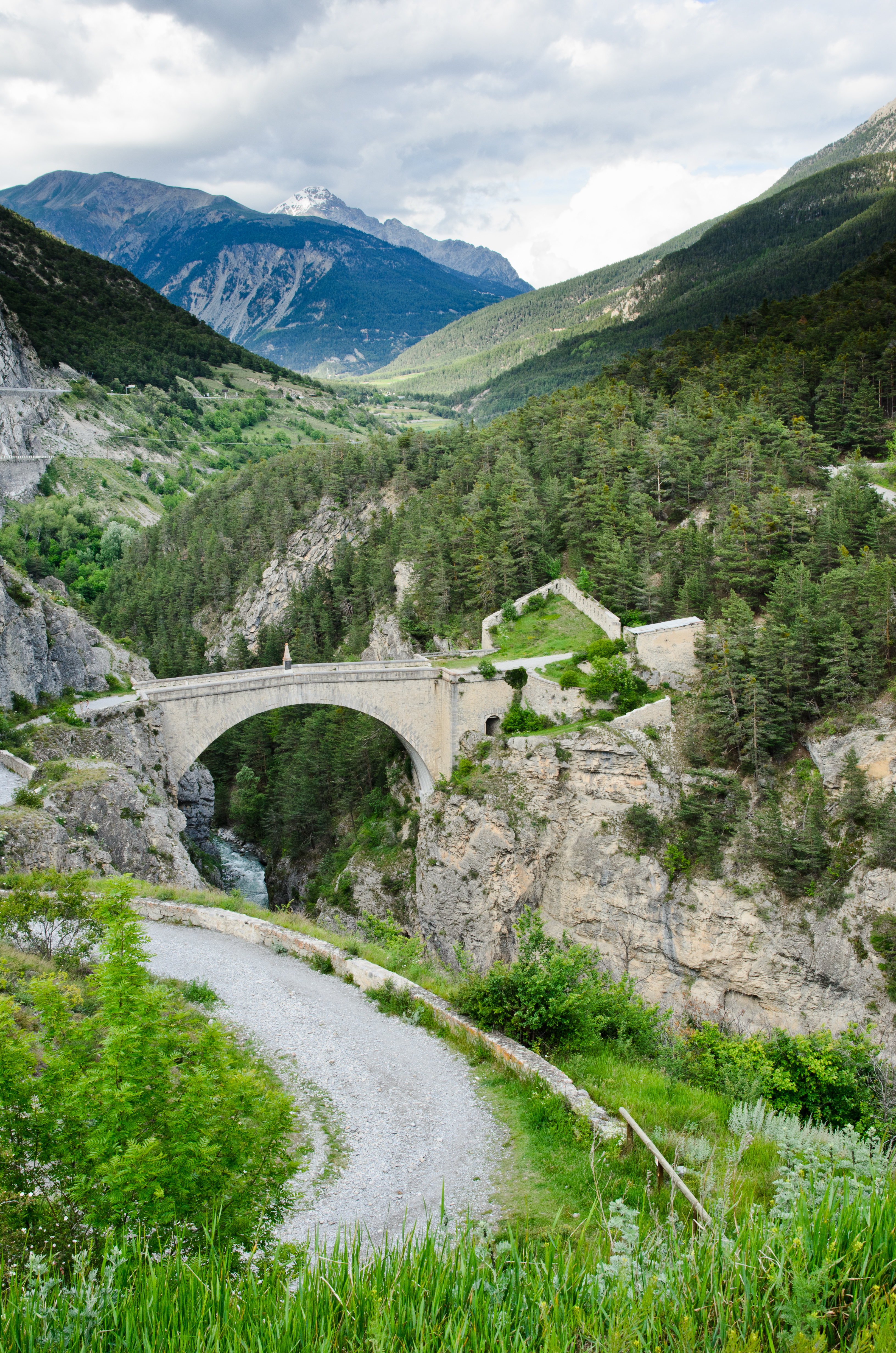 Le pont d'Asfeld vu de la porte avec les vallées avoisinantes